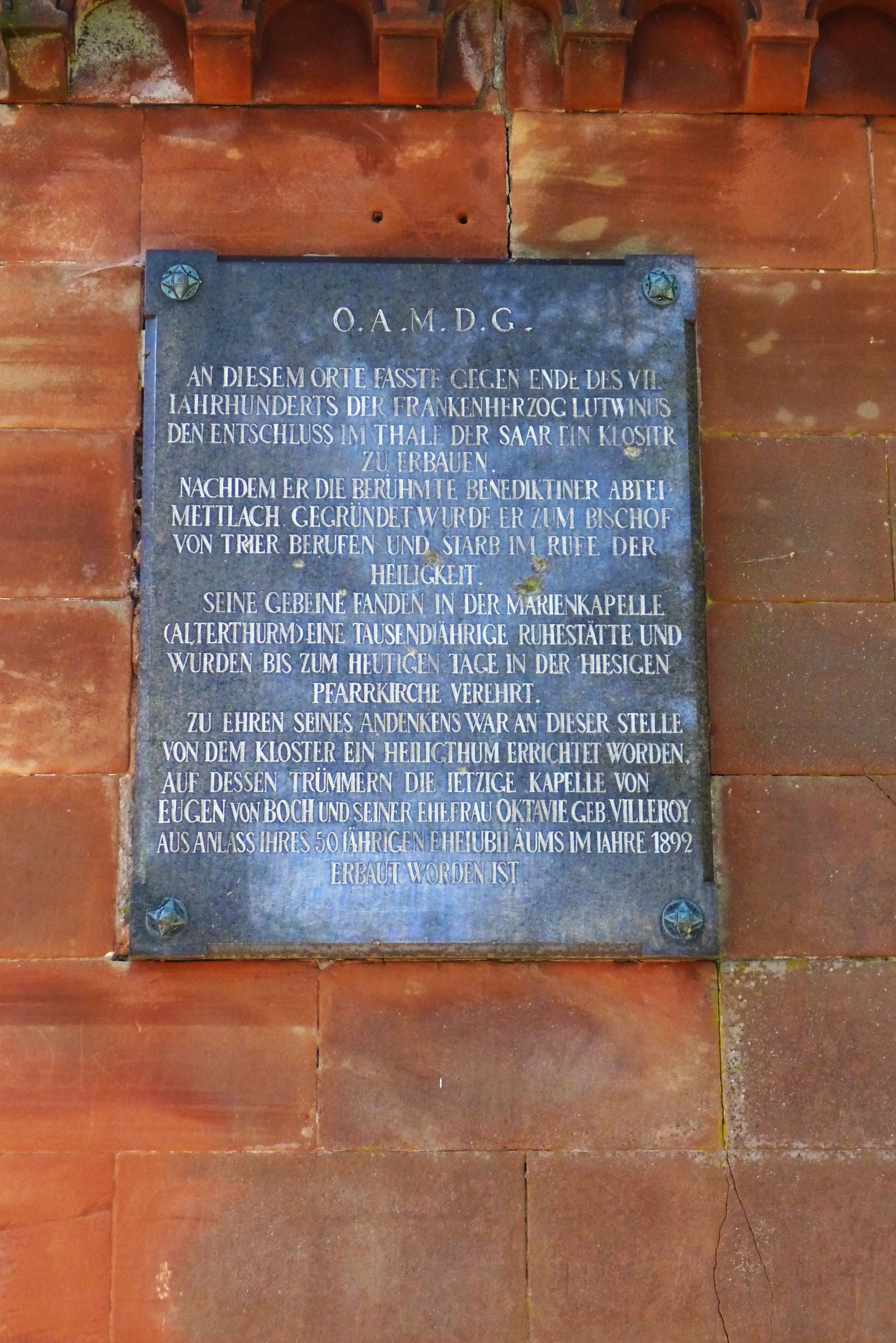 Lutwinuskapelle (Mettlach), Widmungsinschrift